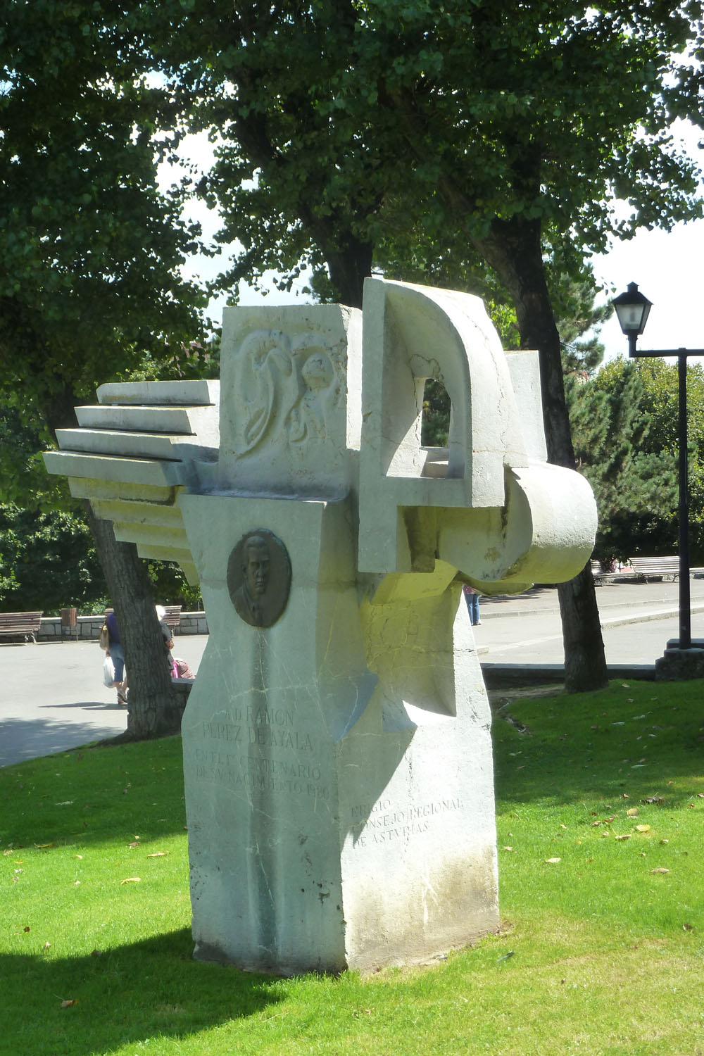 José Antonio Nava, 1980. El Capillín. Oviedo